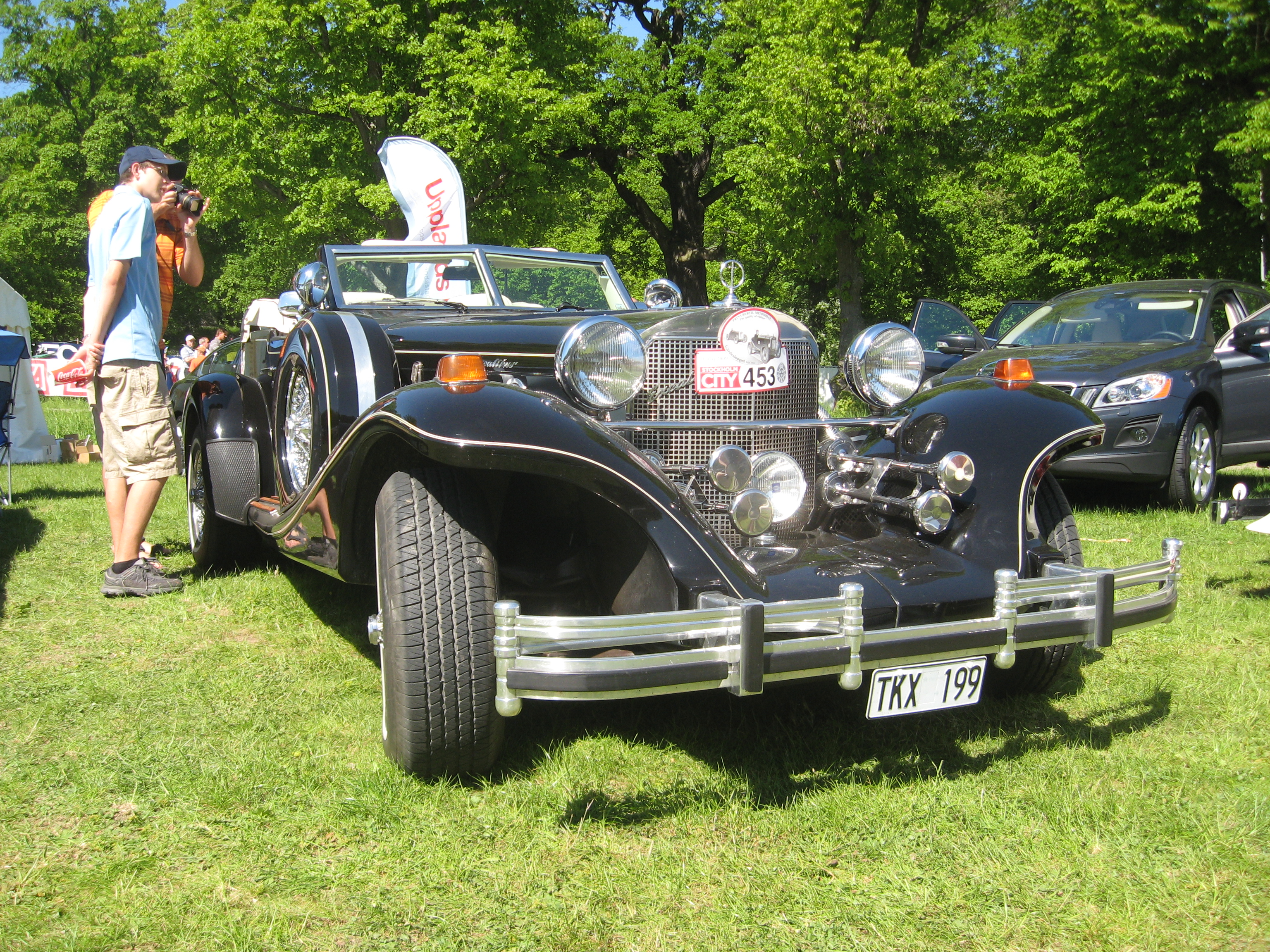 1986 Excalibur